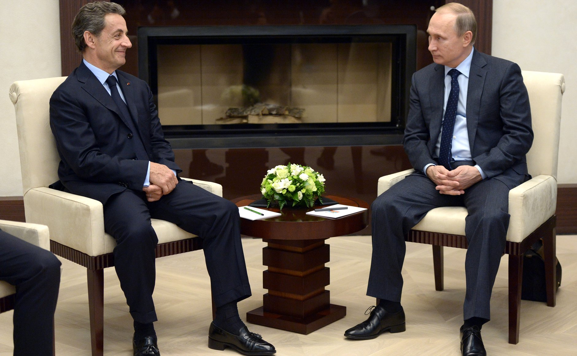 Встреча президента России Владимира Путина с бывшим президентом Французской Республики Николя Саркози